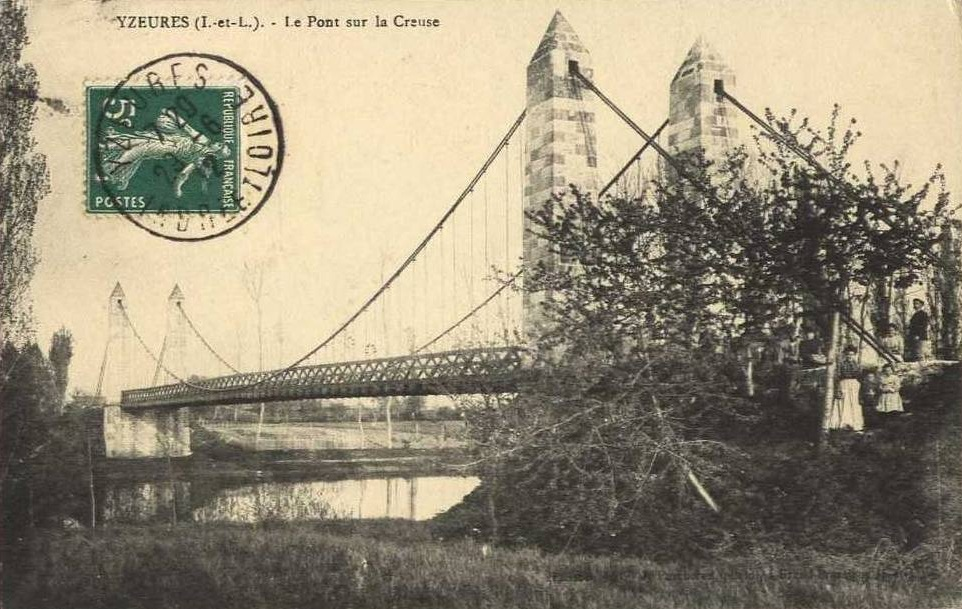 Pont suspendu construit en 1853 et détruit en 1940.